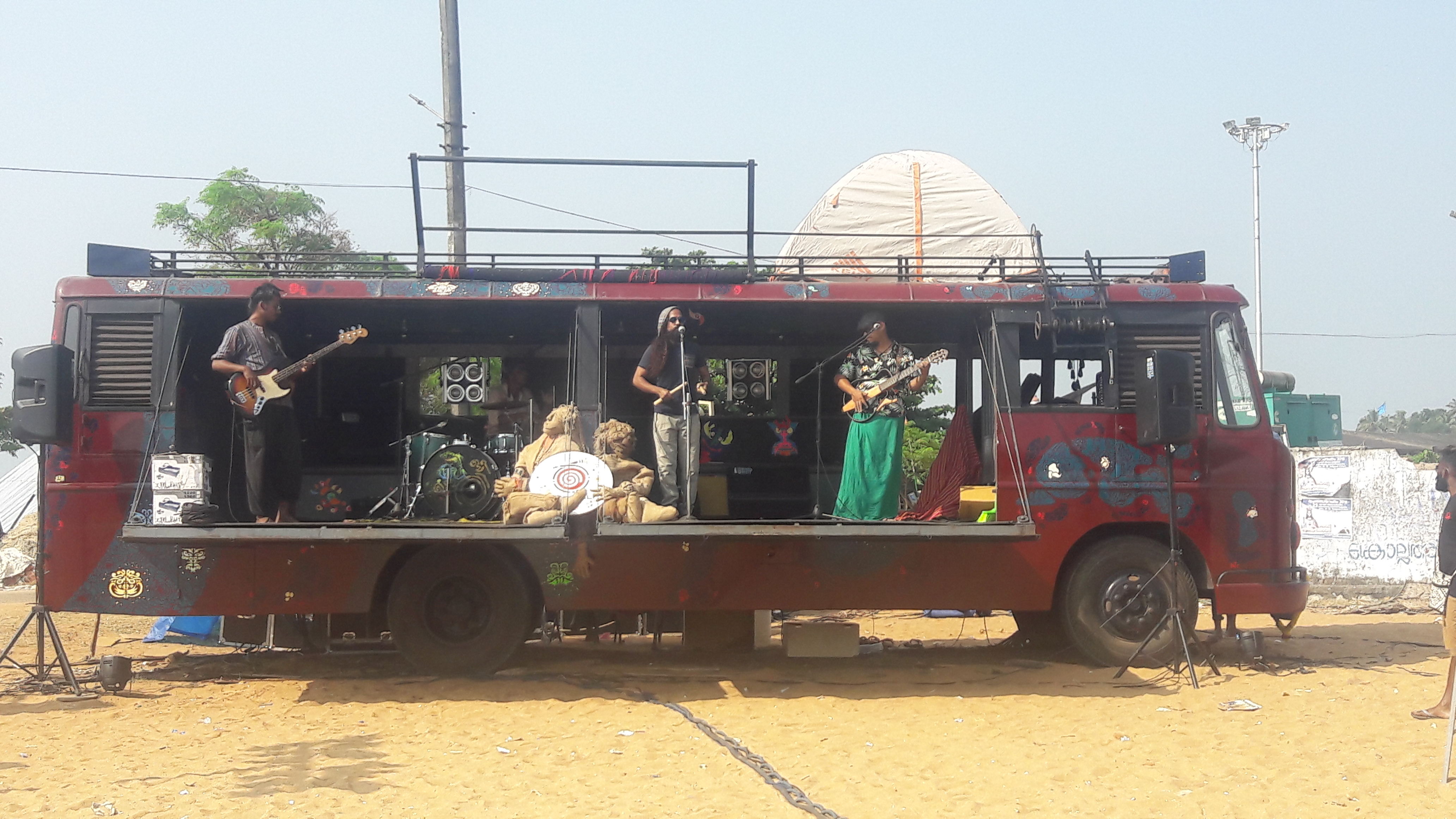 ഊരാളി എക്സ്പ്രസ്(സംഗീത ബാൻഡ്)